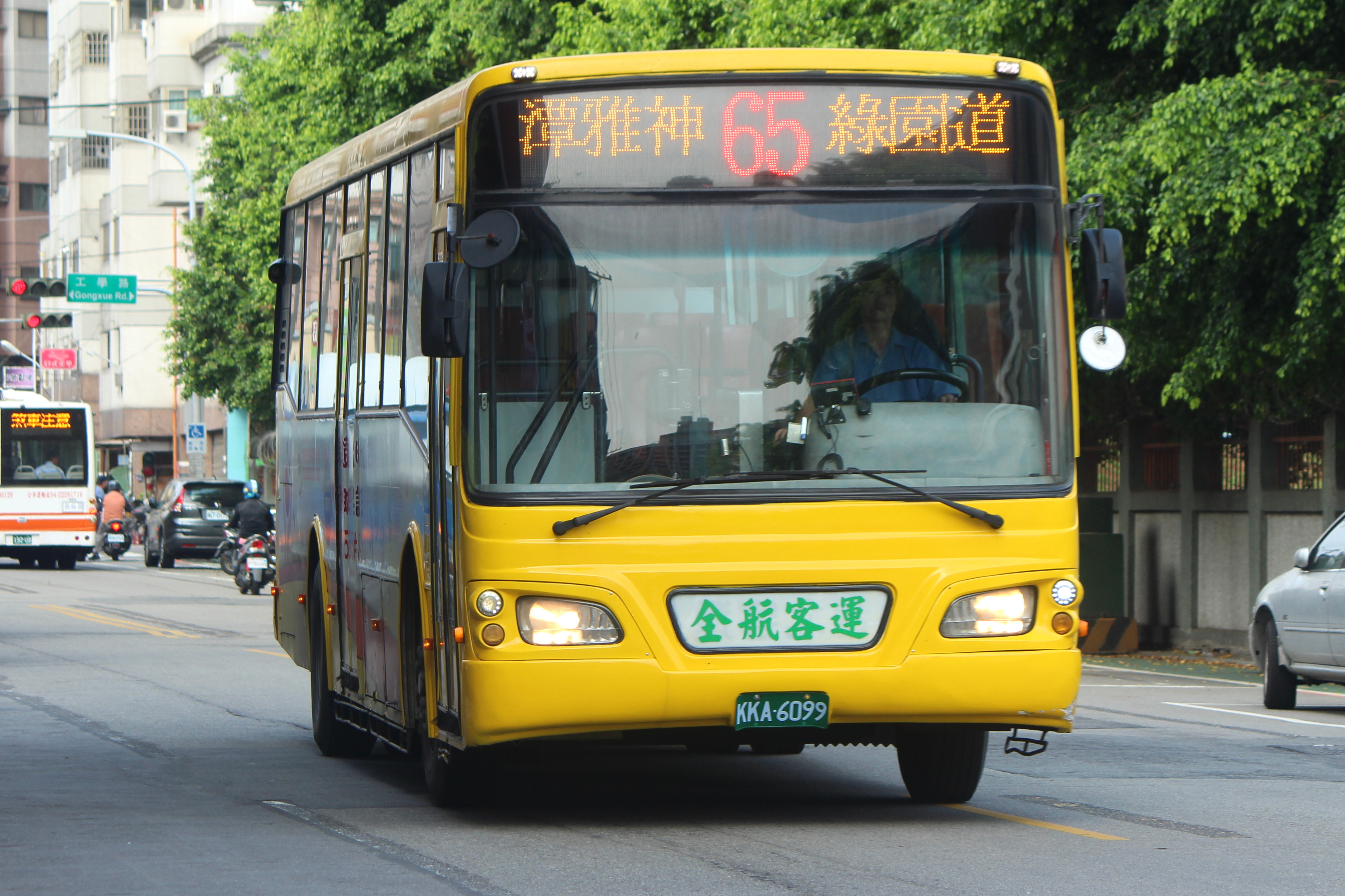 65 台中高工(工學六街)